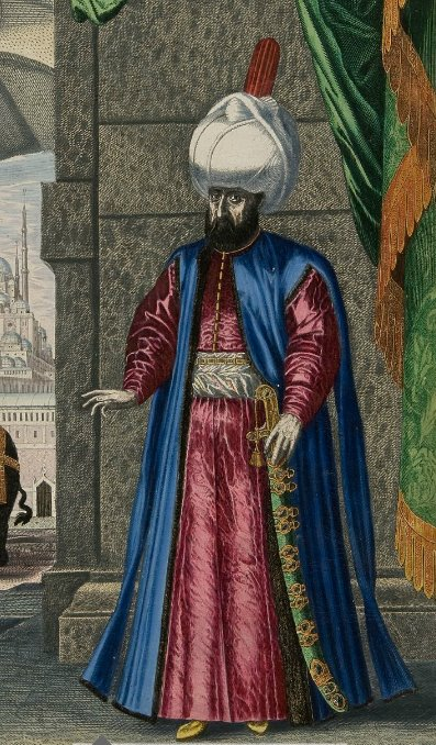 Suleiman